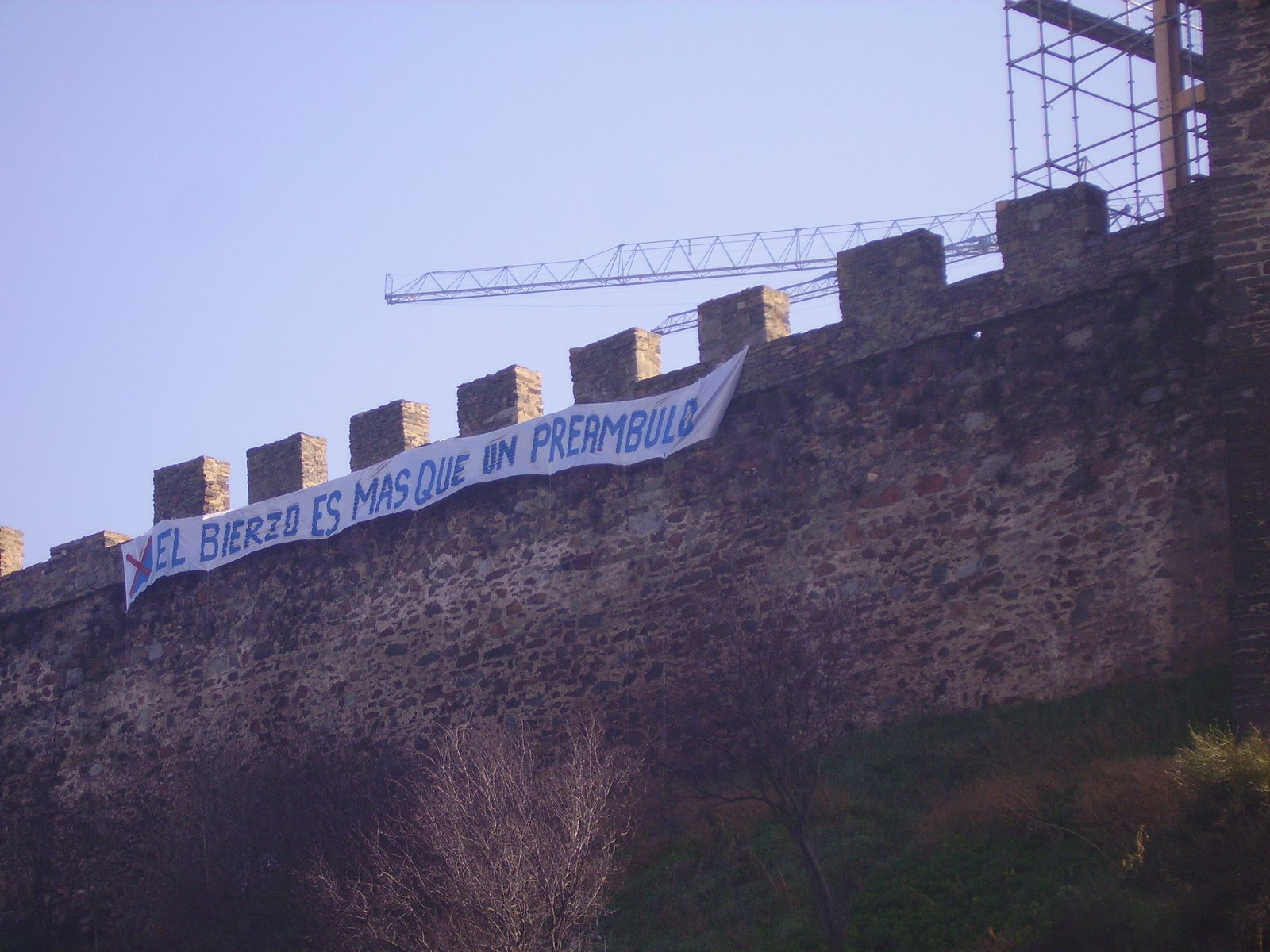 Pancartas colocadas por el Foro Cultural Provincia de El Bierzo y miembros del Partido de El Bierzo en el Castillo de Ponferrada durante la campaña "El Bierzo es más que un preámbulo" reclamando la inclusión (como así al final fue) de la reforma ley de comarcalización de El Bierzo en el articulado del nuevo Estatuto de Autonomía de Castilla y León.